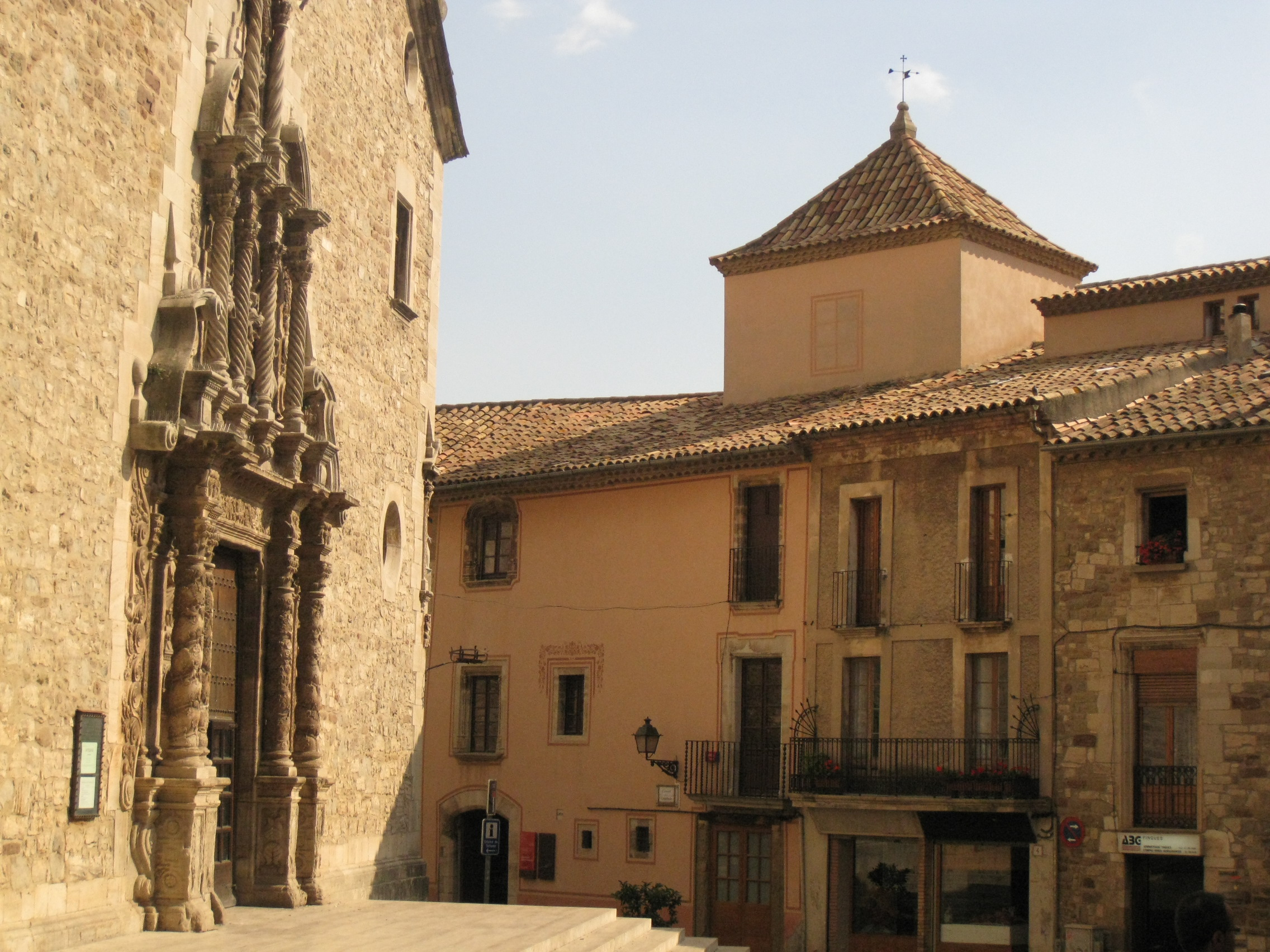 Església parroquial de Santa Maria de Moià